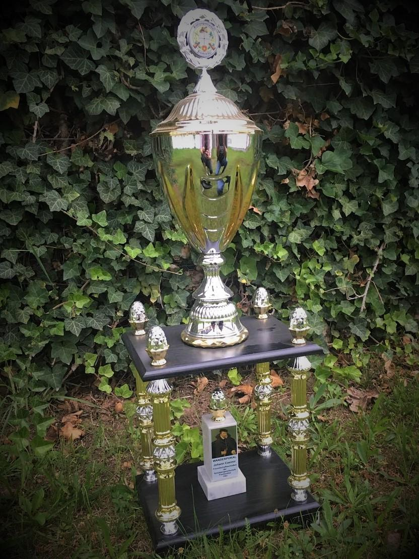 Der Wanderpokal "Johann-Kasimir"